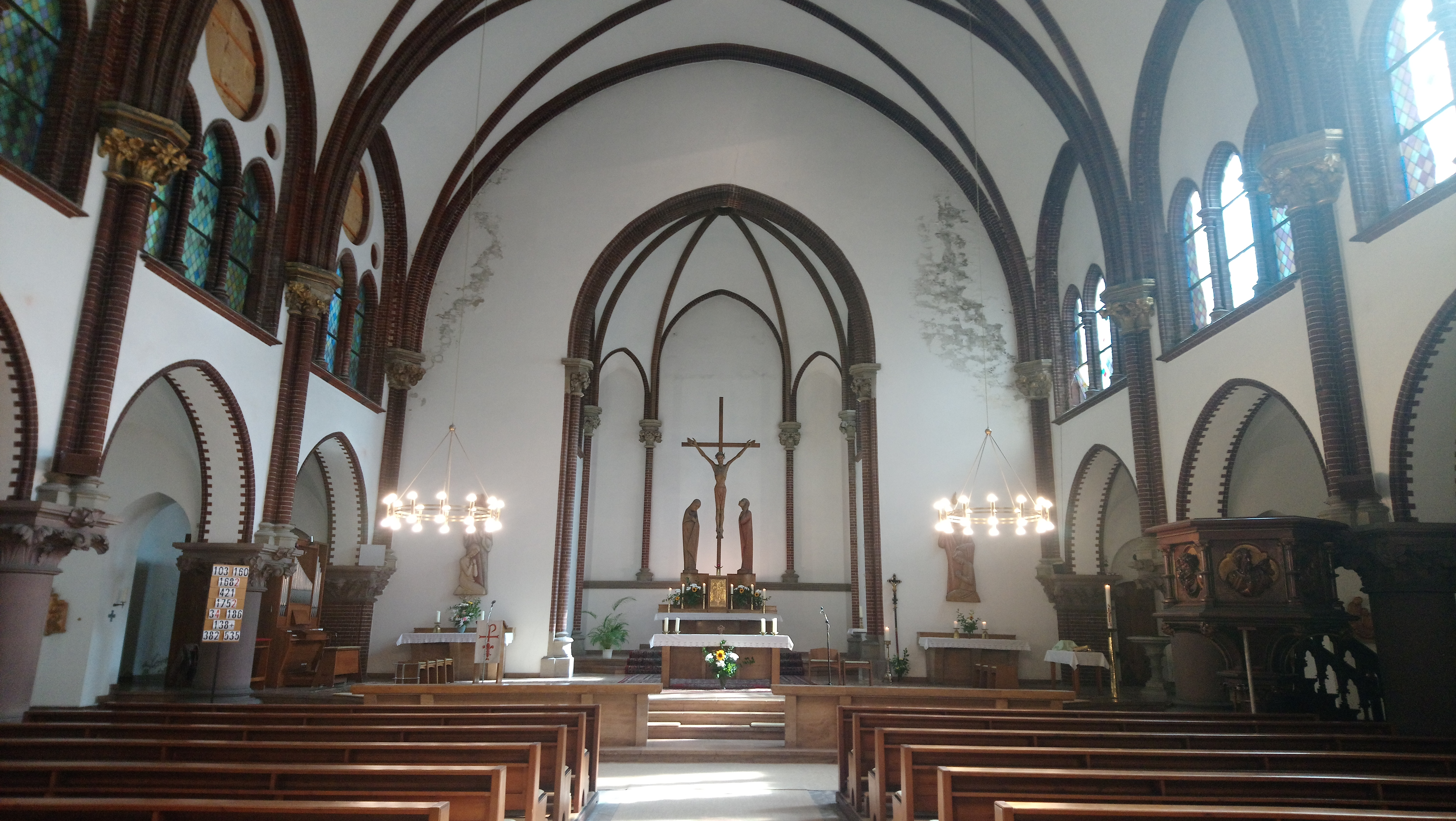 Innenraum (Chor) der katholischen Pfarrkirche St. Pius, Palisade Straße, Berlin-Friedrichshain